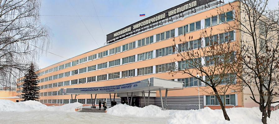 Филиал МЭИ в г. Смоленске